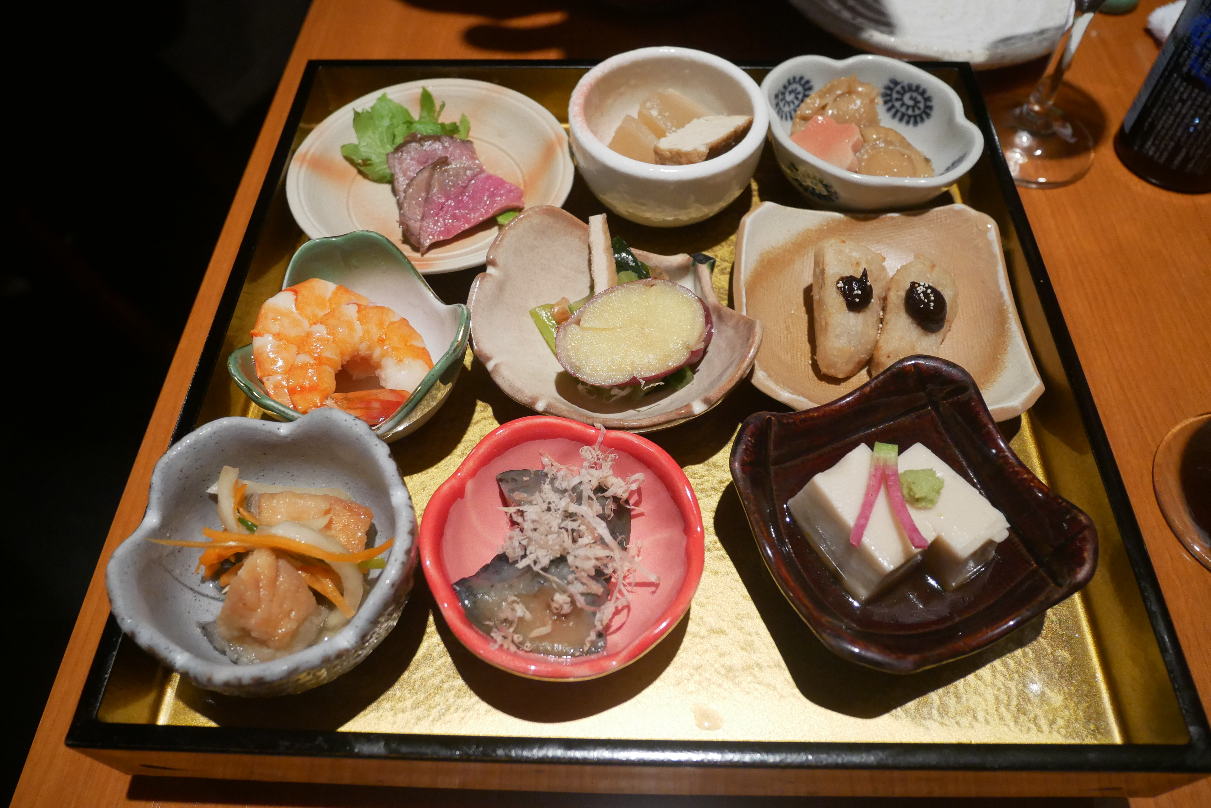 Obanzai (おばんざい)